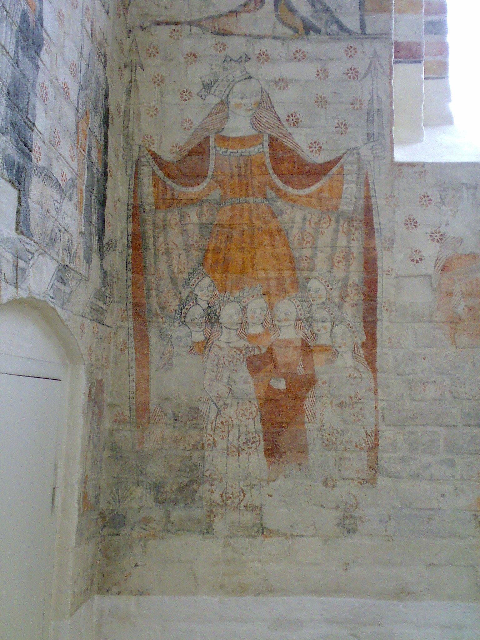 Fresco in Nibe Church, Denmark